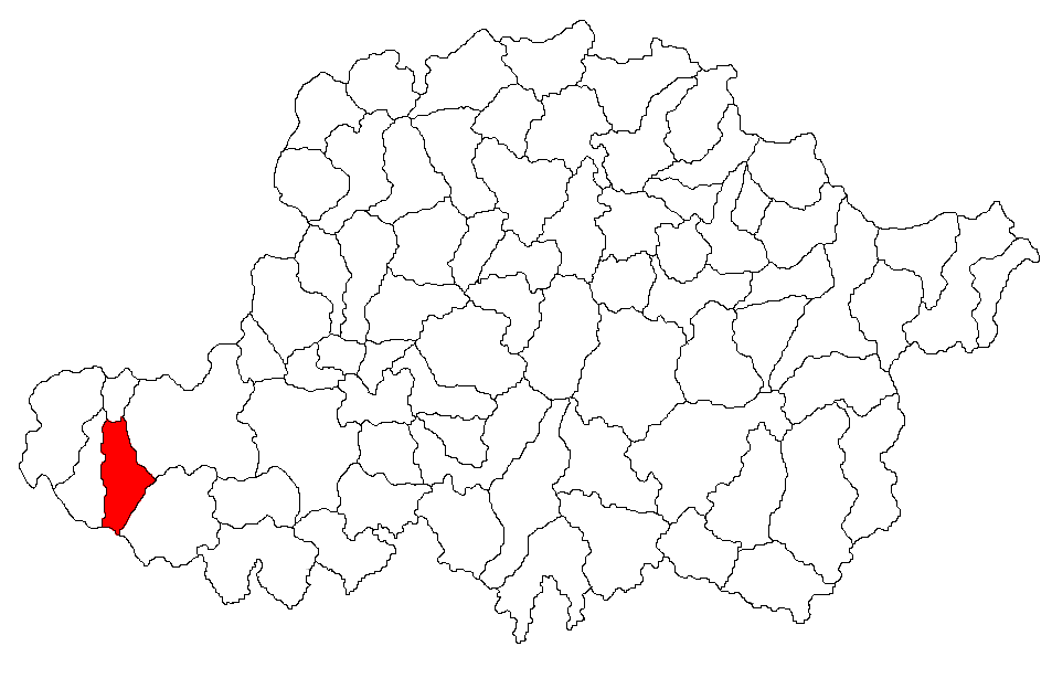 Categorie:Hărţi ale judeţului Arad